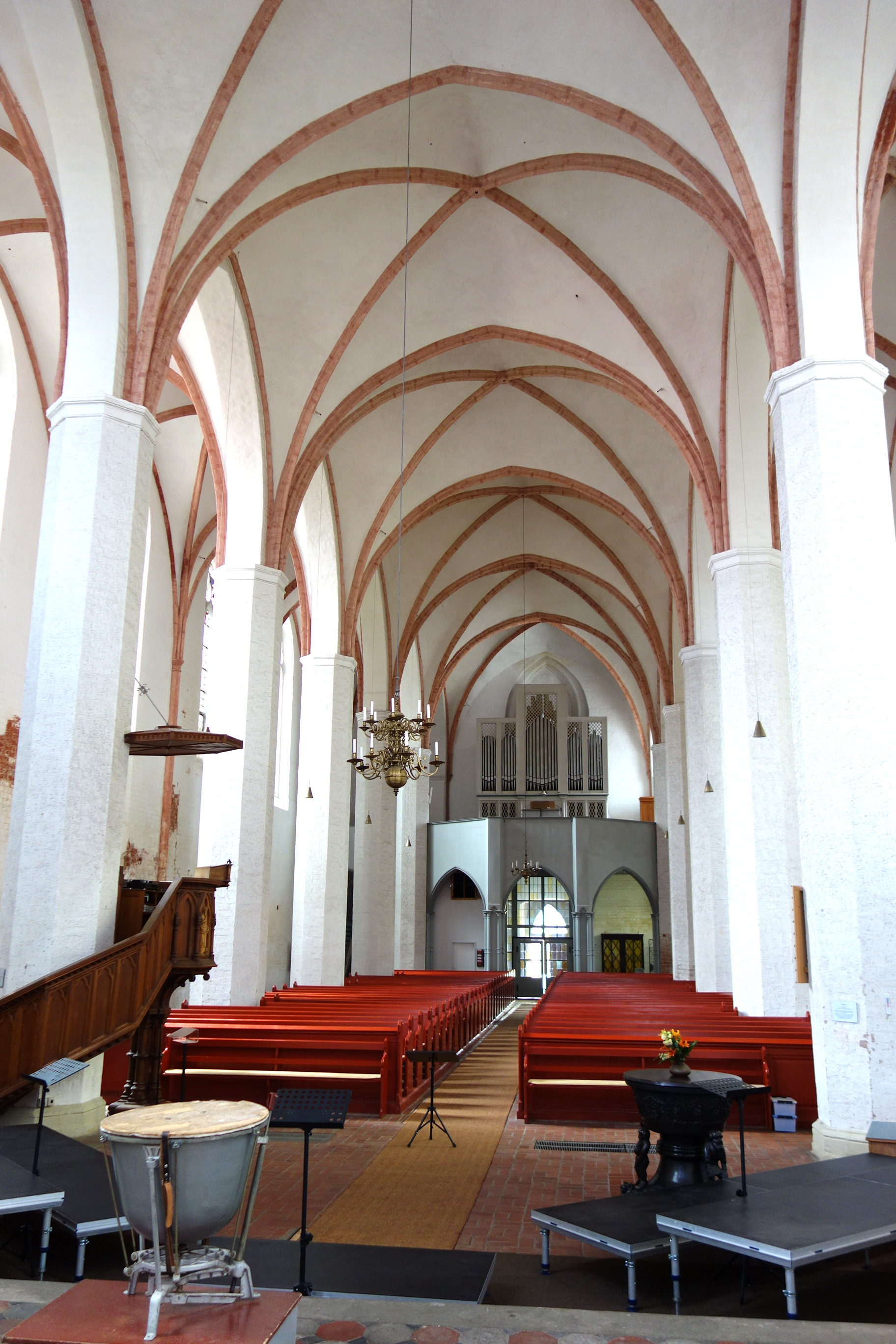 Orgel in St. Nicolaikirche, Prenzlau, Brandenburg, Deutschland